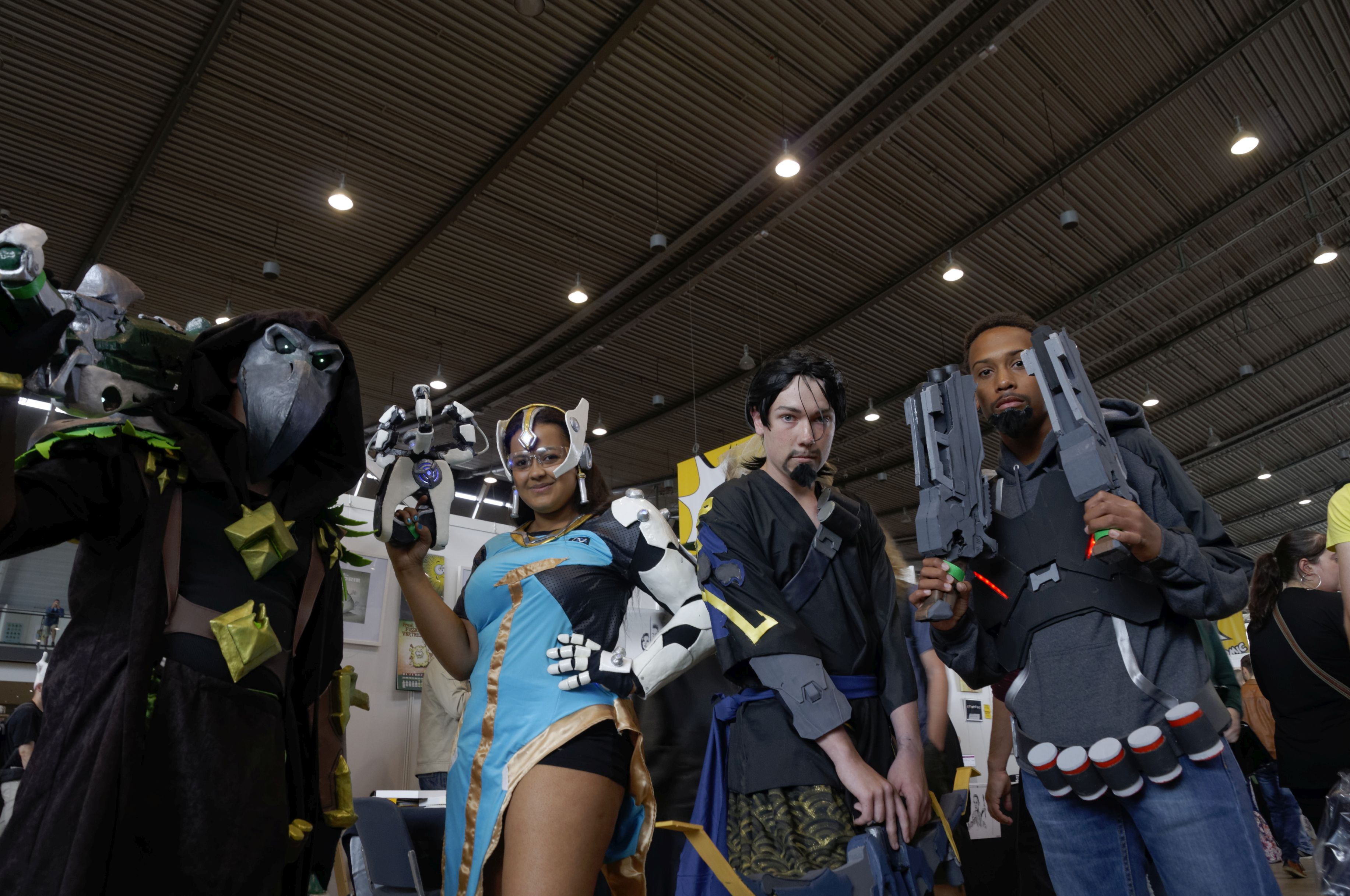 Bilder von der Comic Con Germany in Stuttgart 2017